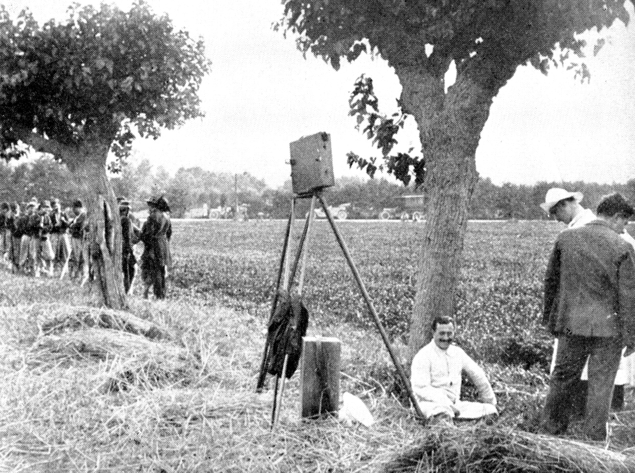 Nozze d'oro (Maggi, 1911) - foto set con Ambrosio